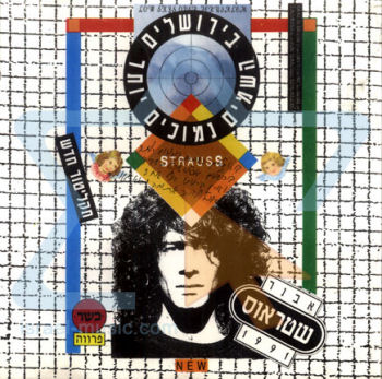 עטיפת האלבום בירושלים השמים נמוכים יותר / אבנר שטראוס